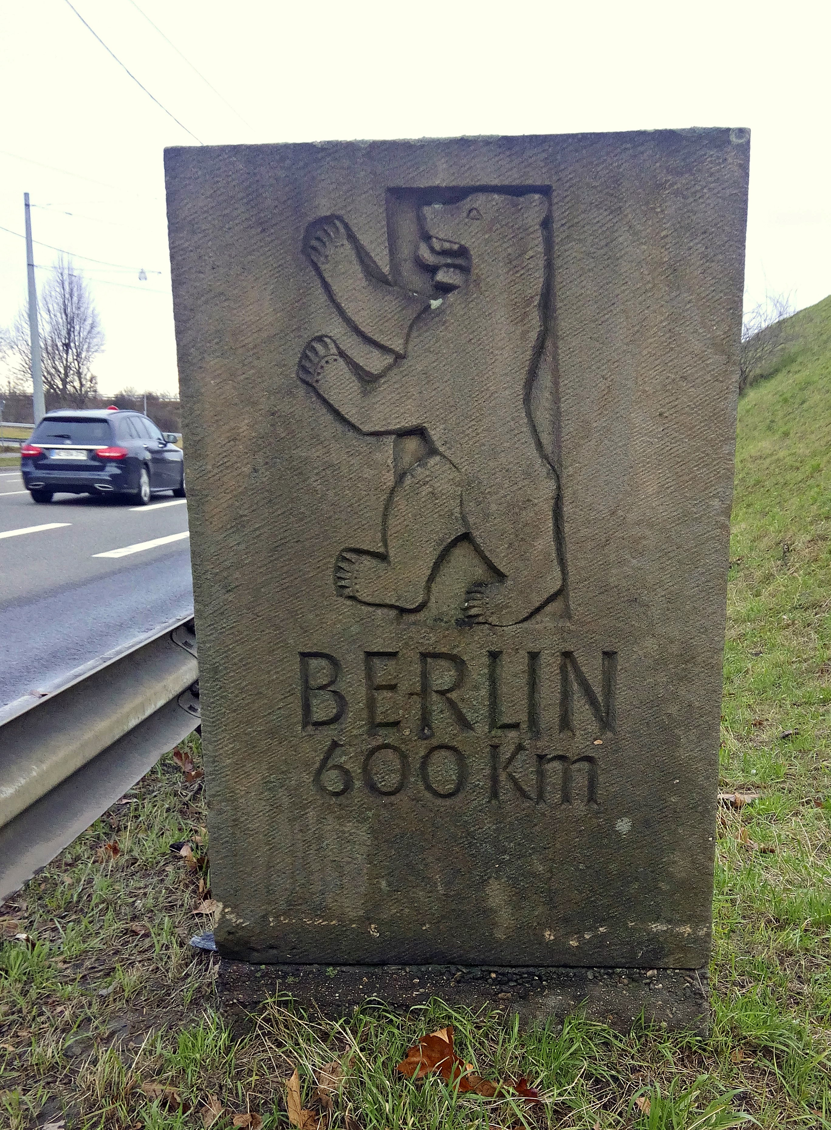 Berlin-Gedenkstein, Frankenthal, 1964, von Georg Schubert (1899-1968)